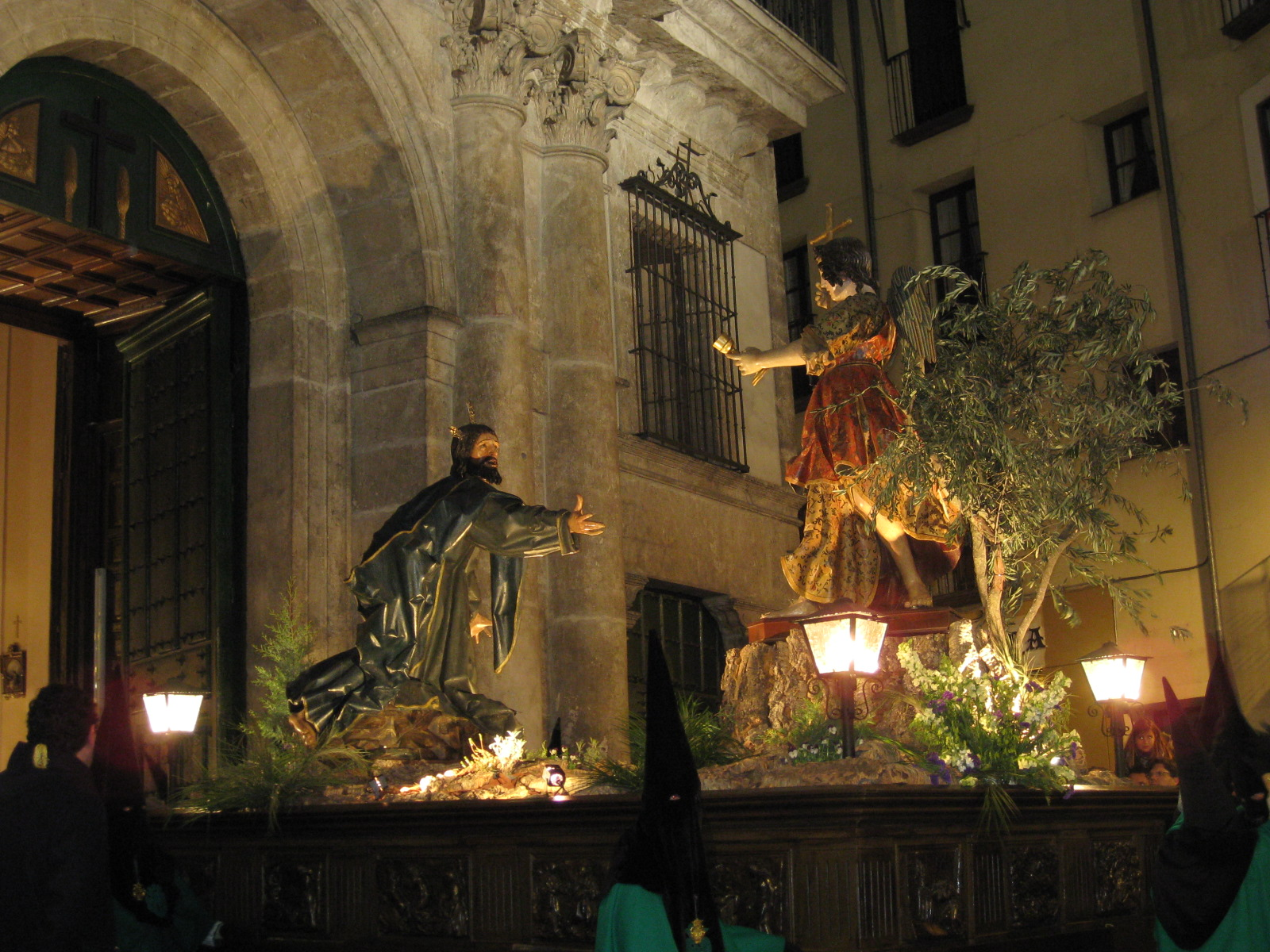 Paso de la Oración del Huerto. Cofradía Penitencial de la Santa Vera Cruz, Valladolid (España).